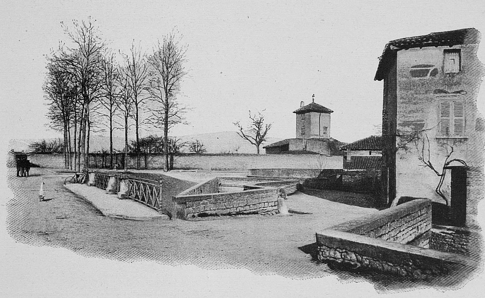 Dictionnaire illustré des communes du département du Rhône. Tome 1 / par MM. E. de Rolland et D. Clouzet.